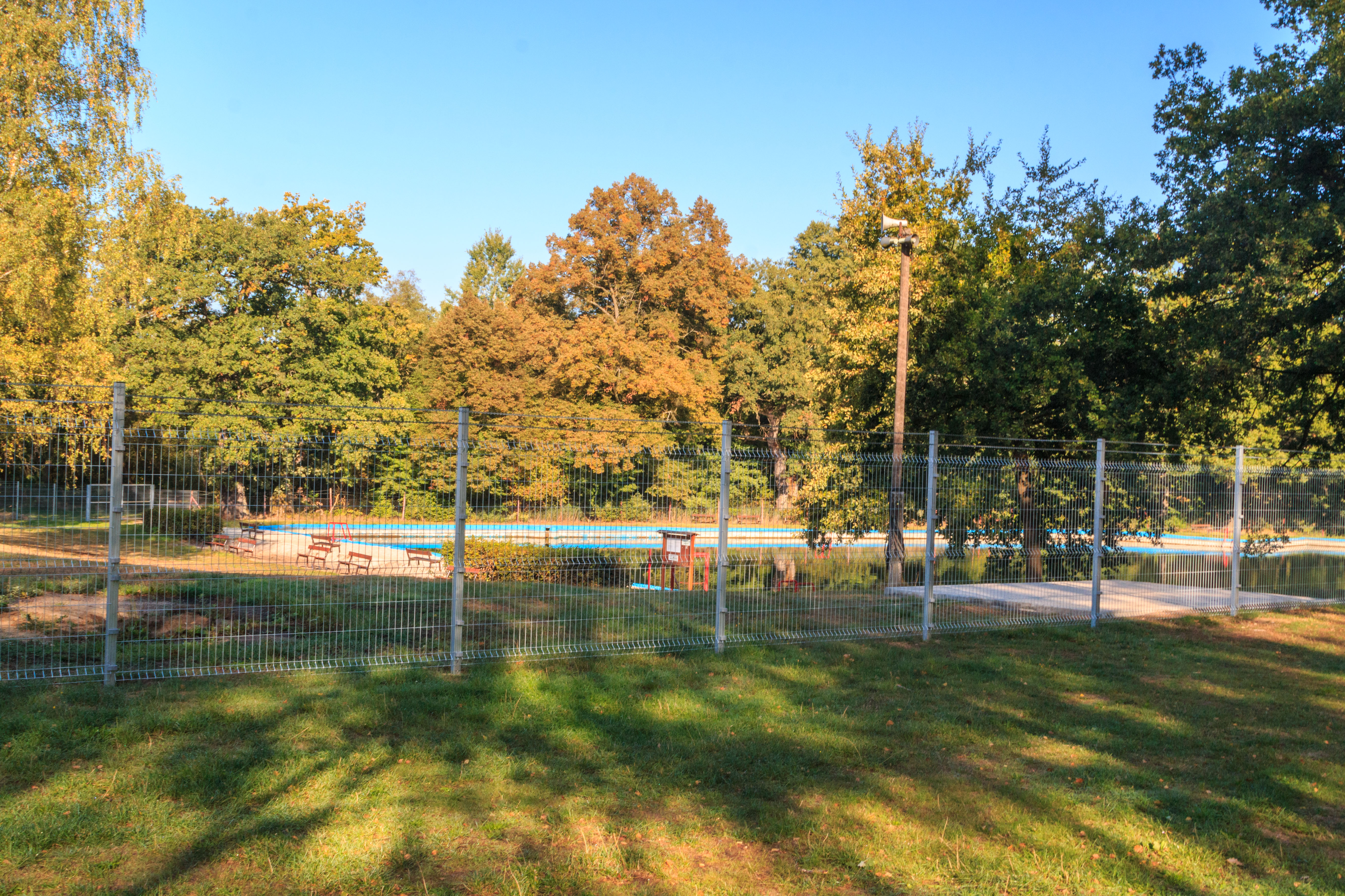 Koupaliště v Mimoni Project: Vodstvo.